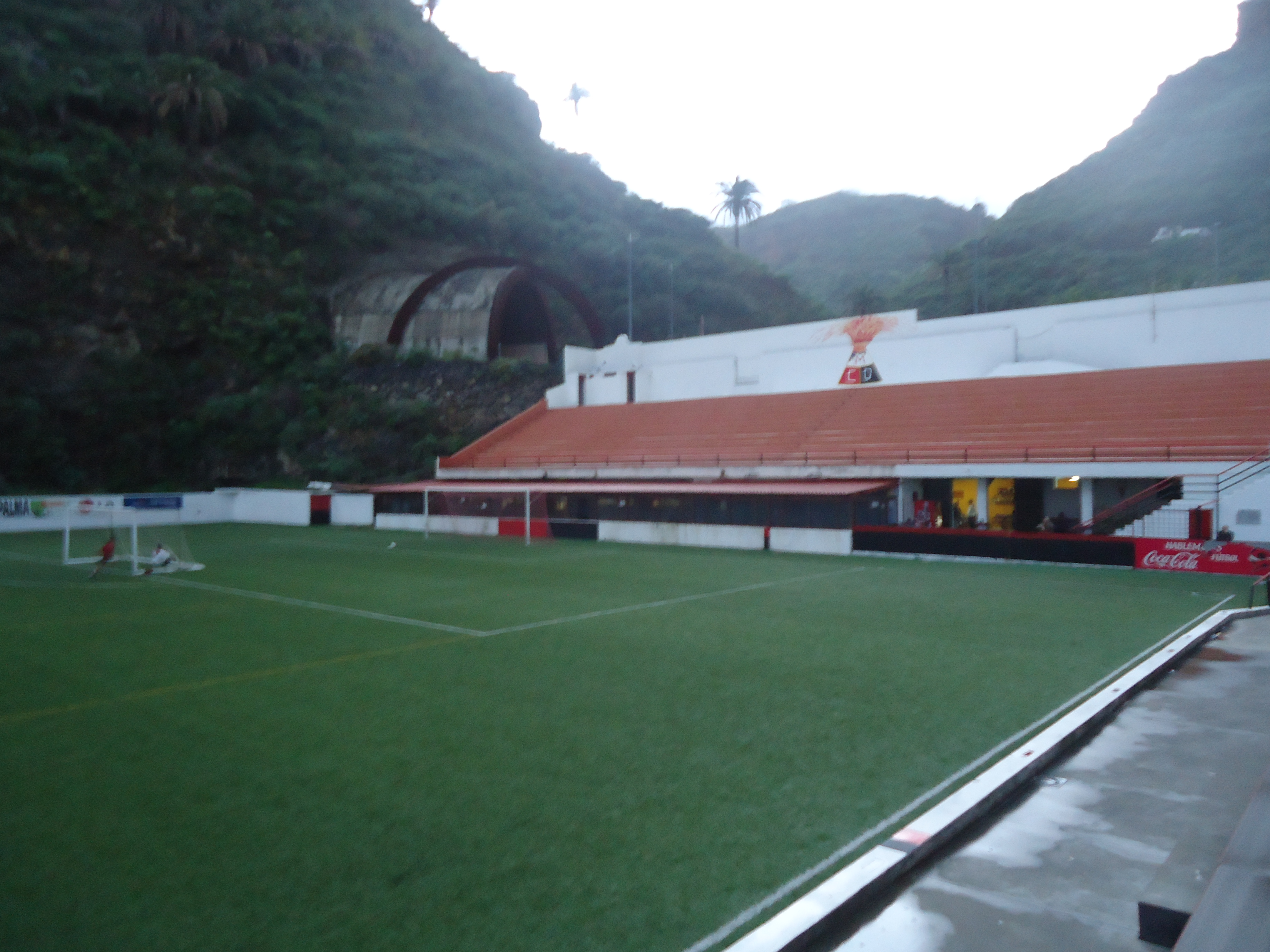 Fondo Oeste del Estadio del CD Mensajero